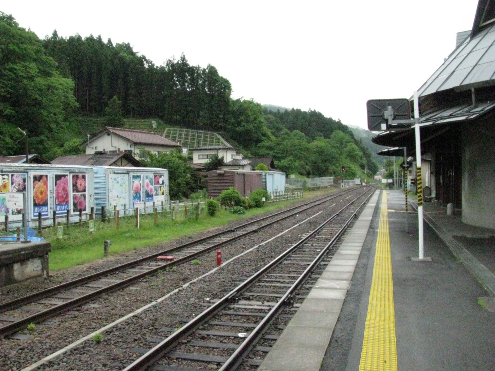 JR水郡線磐城塙駅